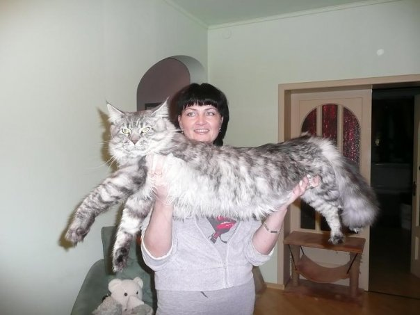 Мейн Кун на руках